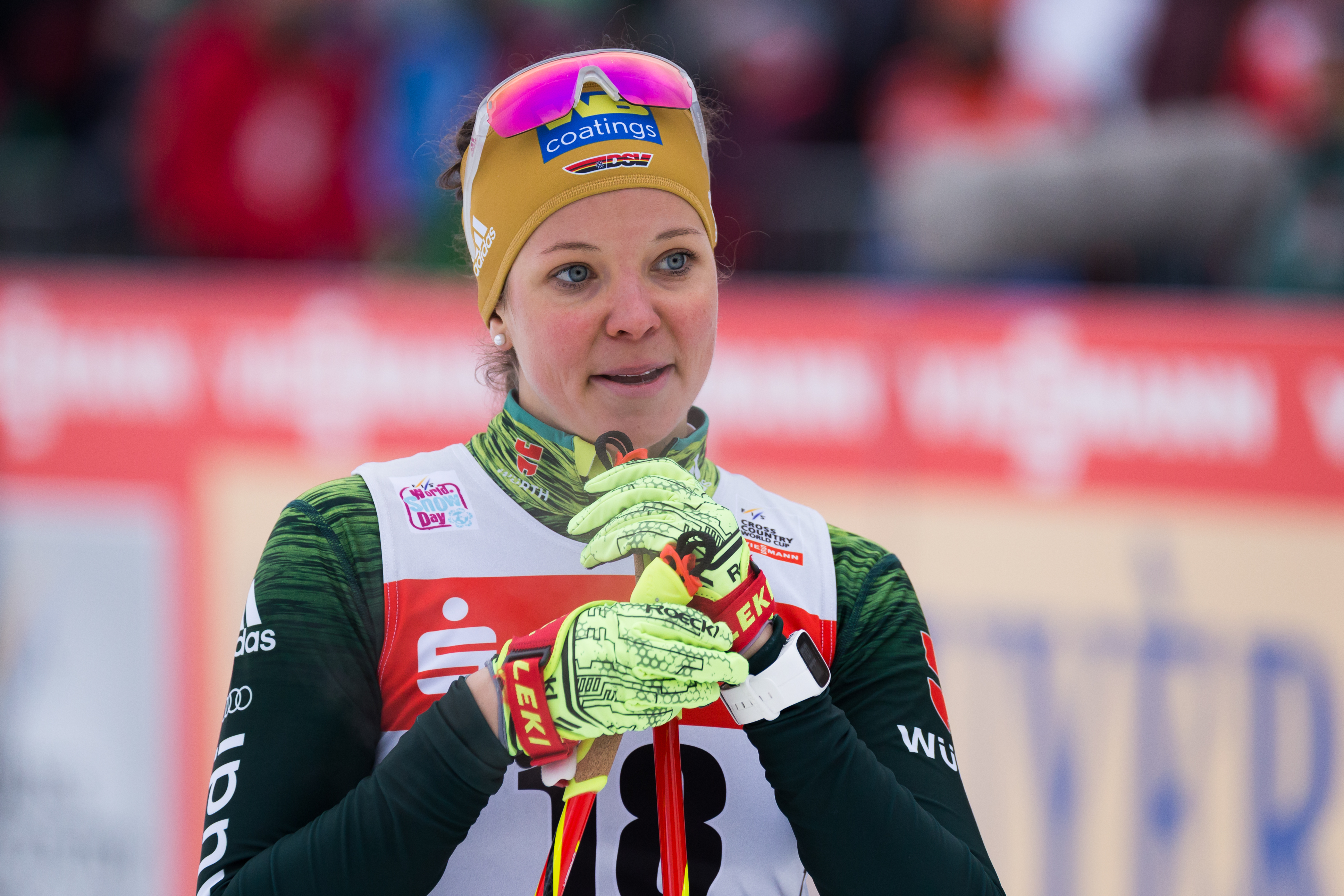 Elisabeth Schicho (GER, Deutschland)